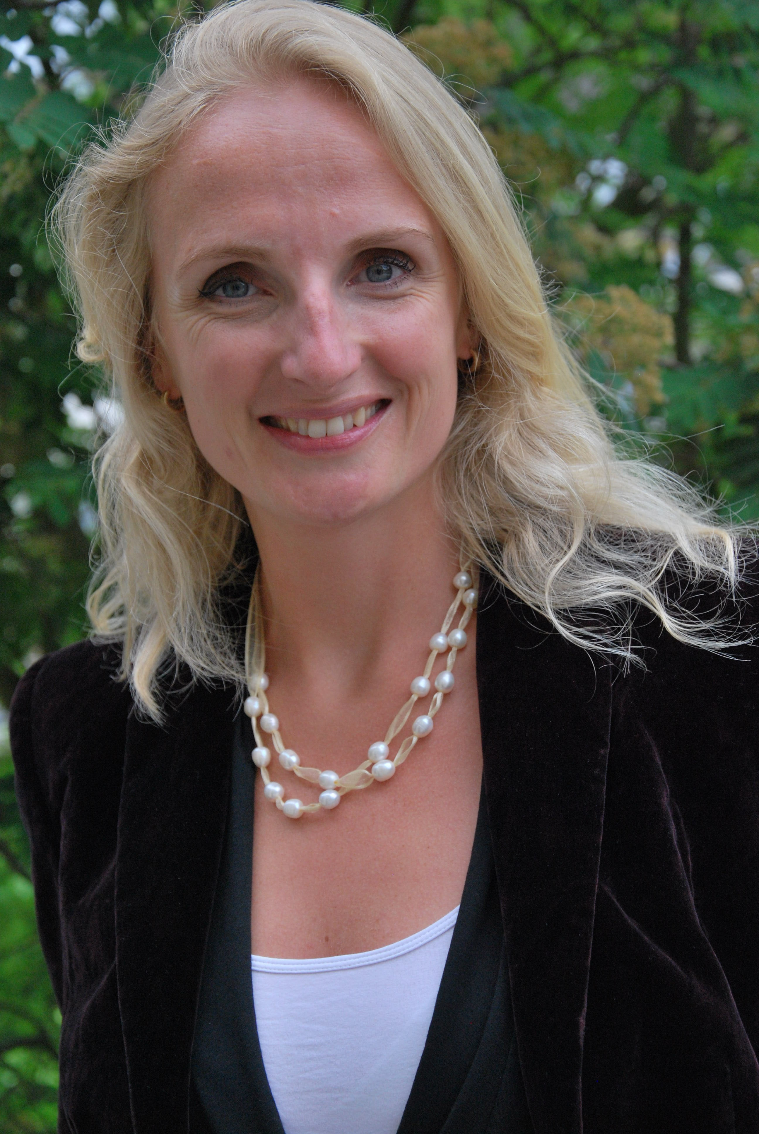 Esther (Eske) van Egerschot (Delfzijl, 3 mei 1977) is een Nederlandse ex-politica van de VVD.